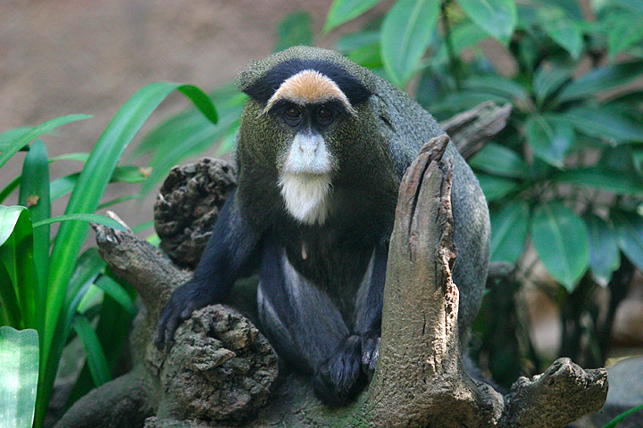 (De Brazza's Monkey) taken at the Los Angeles Zoo